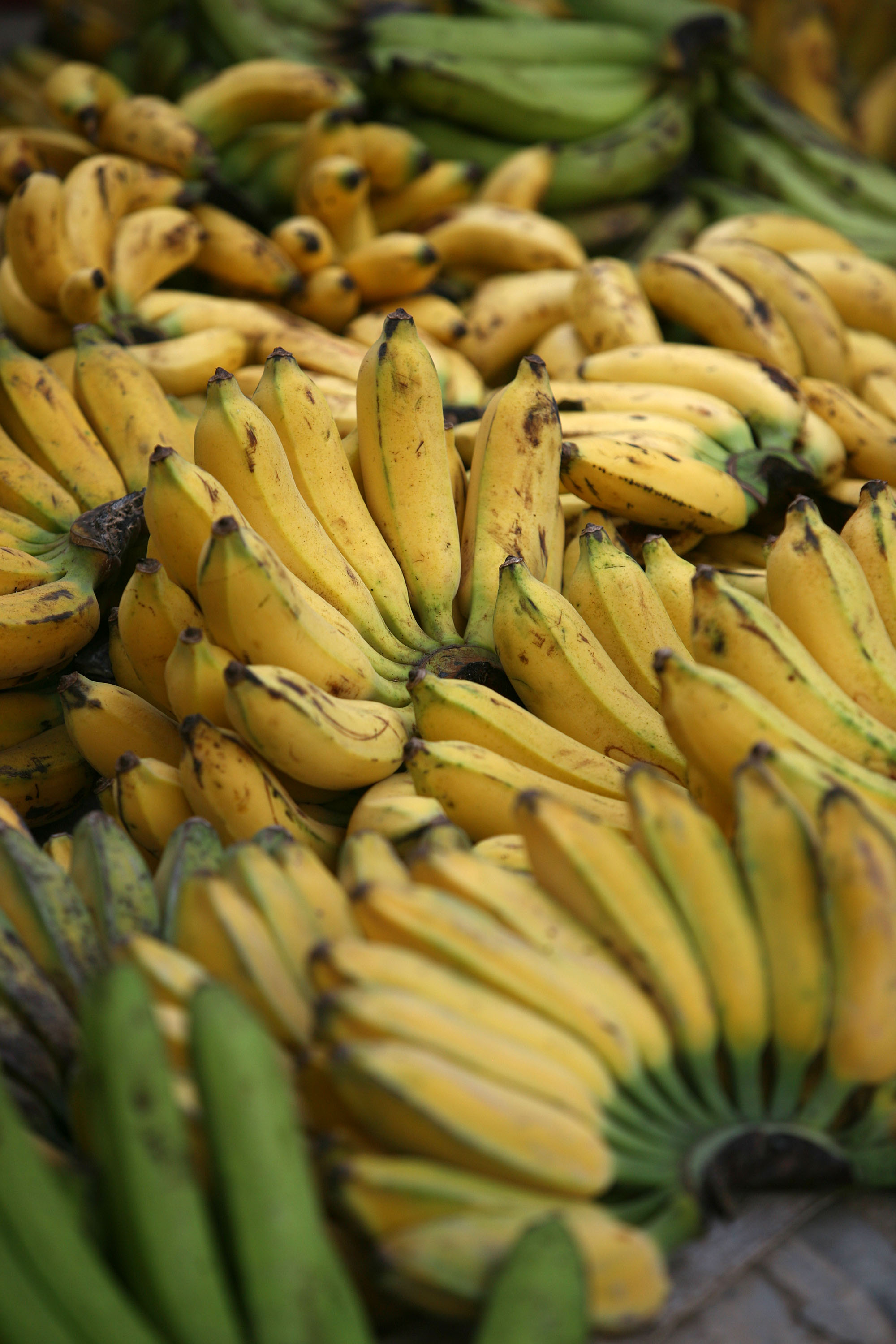 Bananas being sold at a market in Lombok, Indonesia.